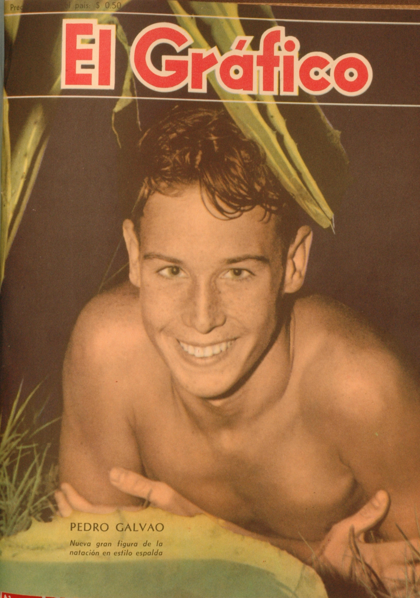 El Grafico del 14 de Abril de 1950. Edicion 1601